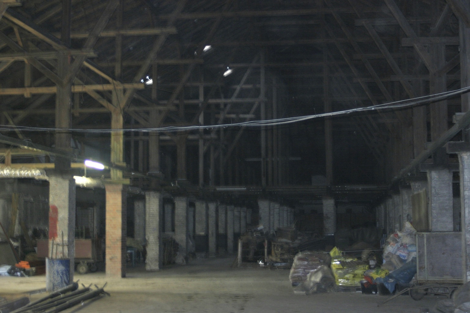 Innenansicht des Klinkerwerkes in Neuengamme